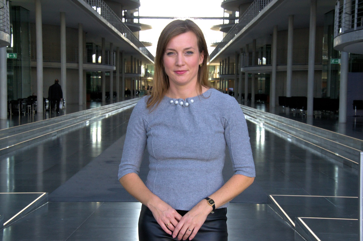 Siemtje Möller im Paul-Löbe-Haus